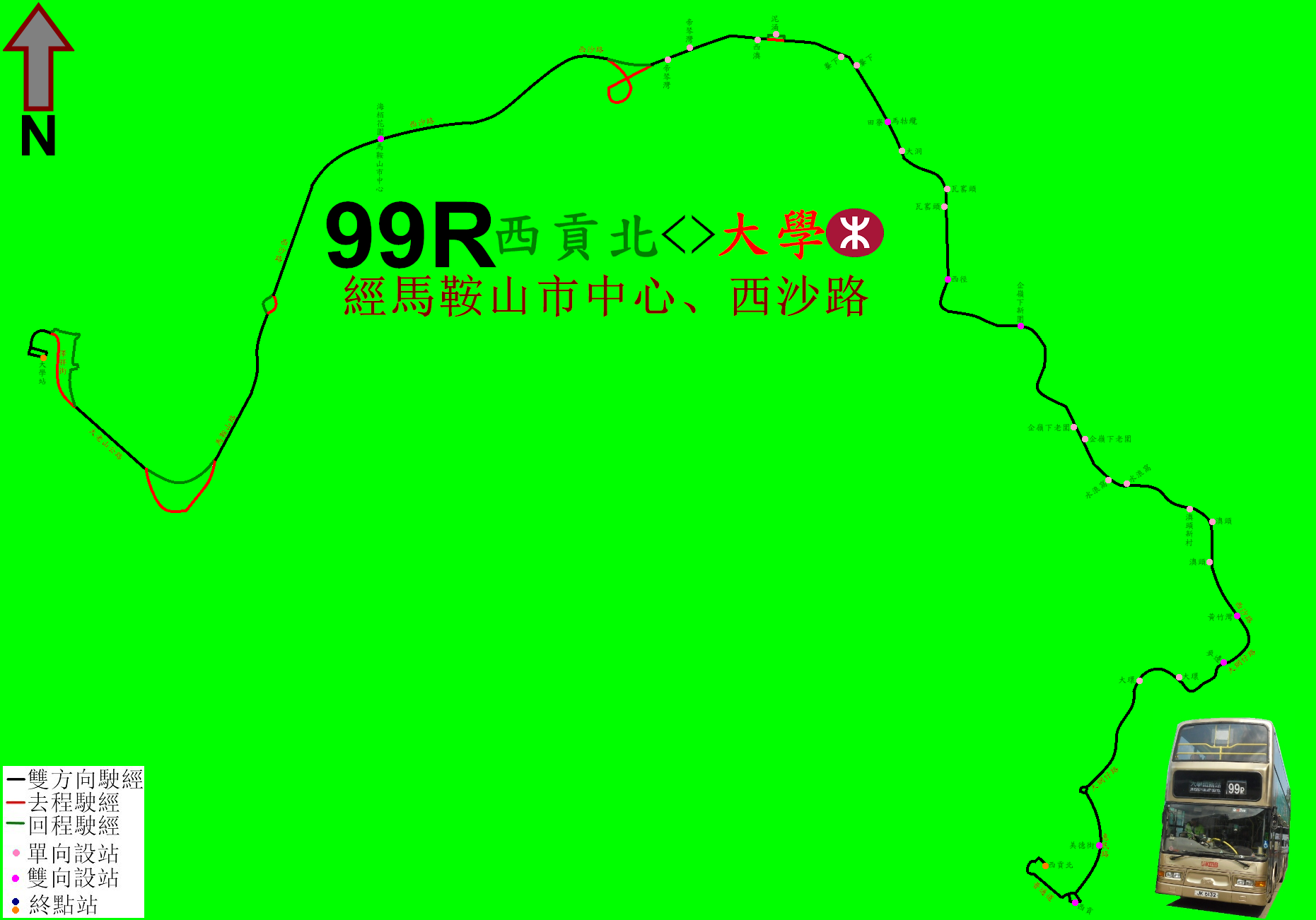 中文（香港）: 九巴99R線的走線圖